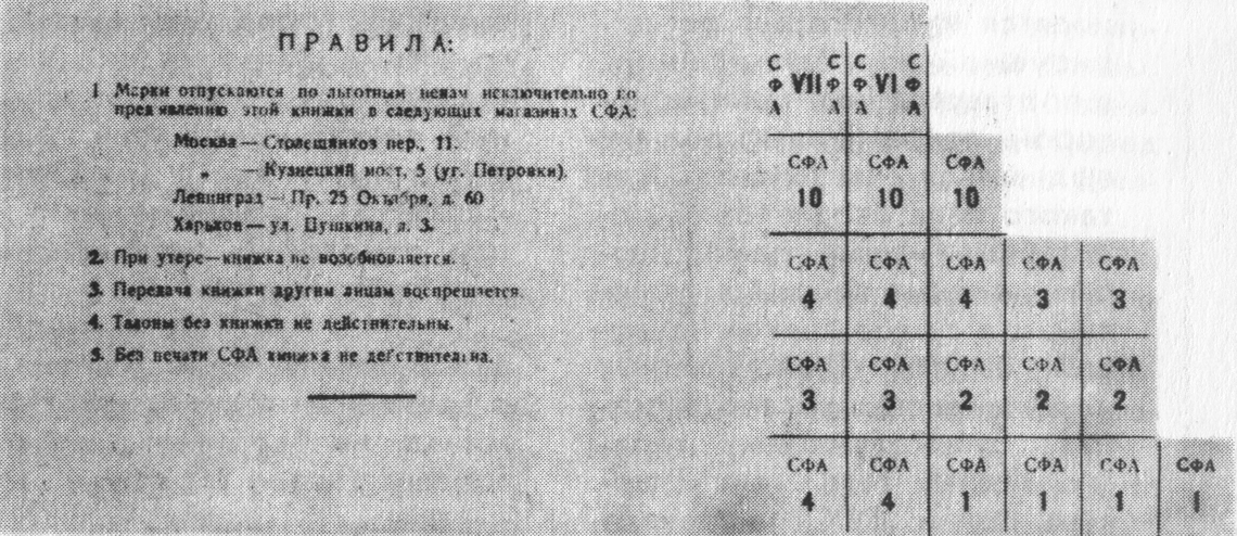 Талоны абонемента СФА